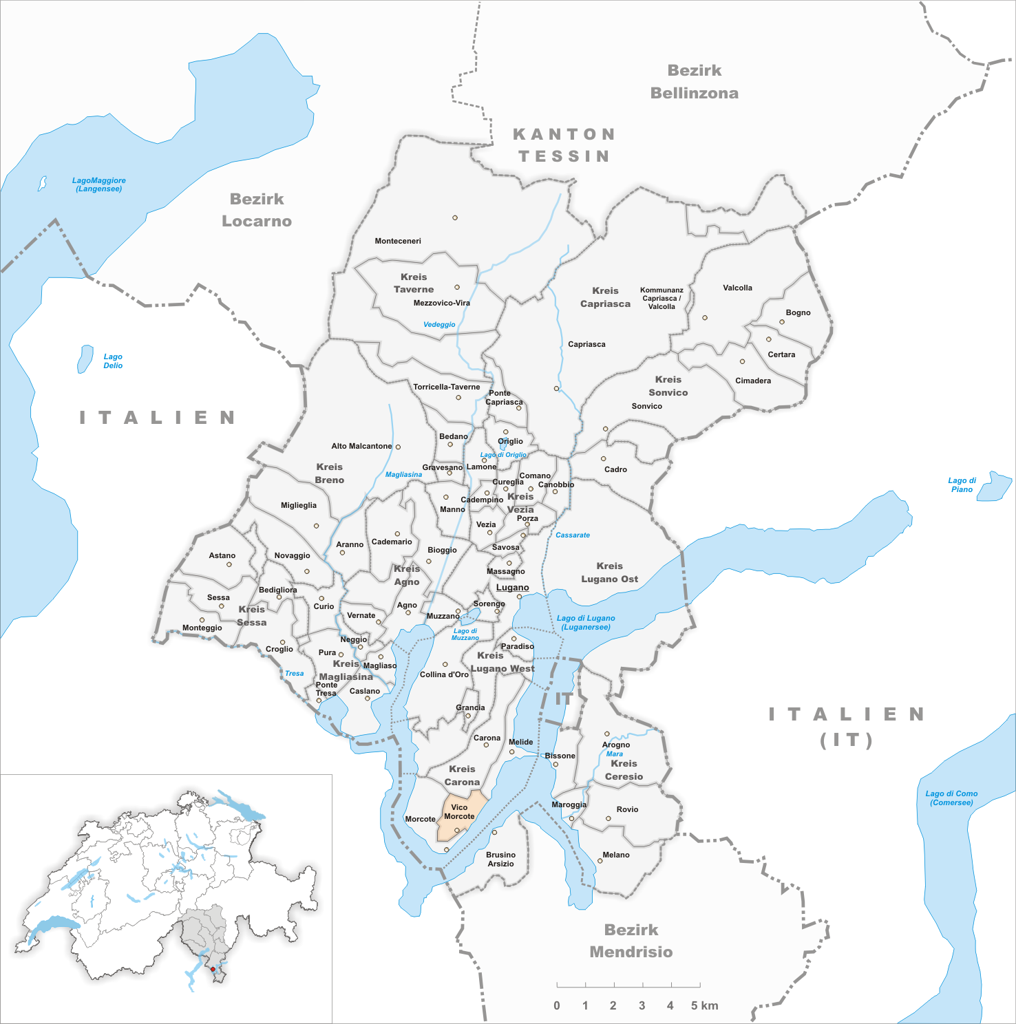 Municipality Vico Morcote